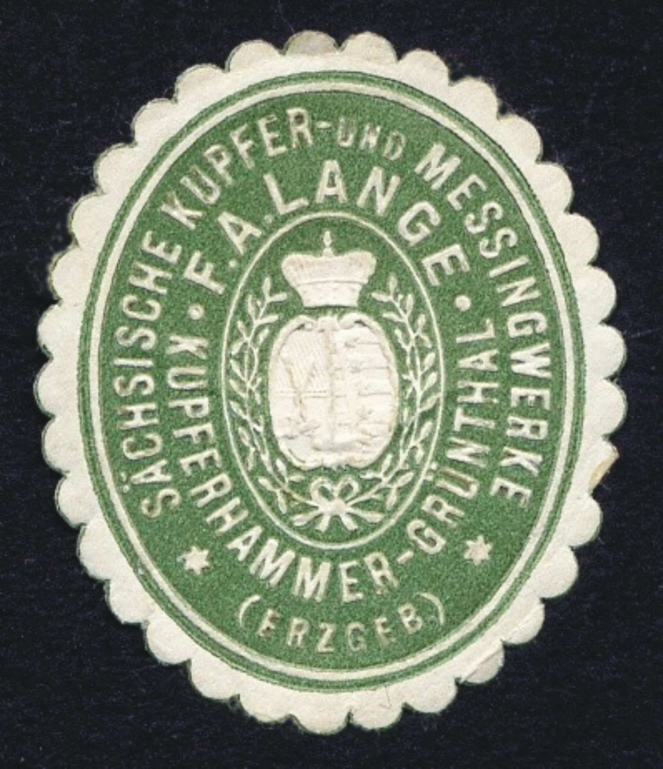 Siegelmarke vom Kupferhammer Grünthal (etwa 1880)